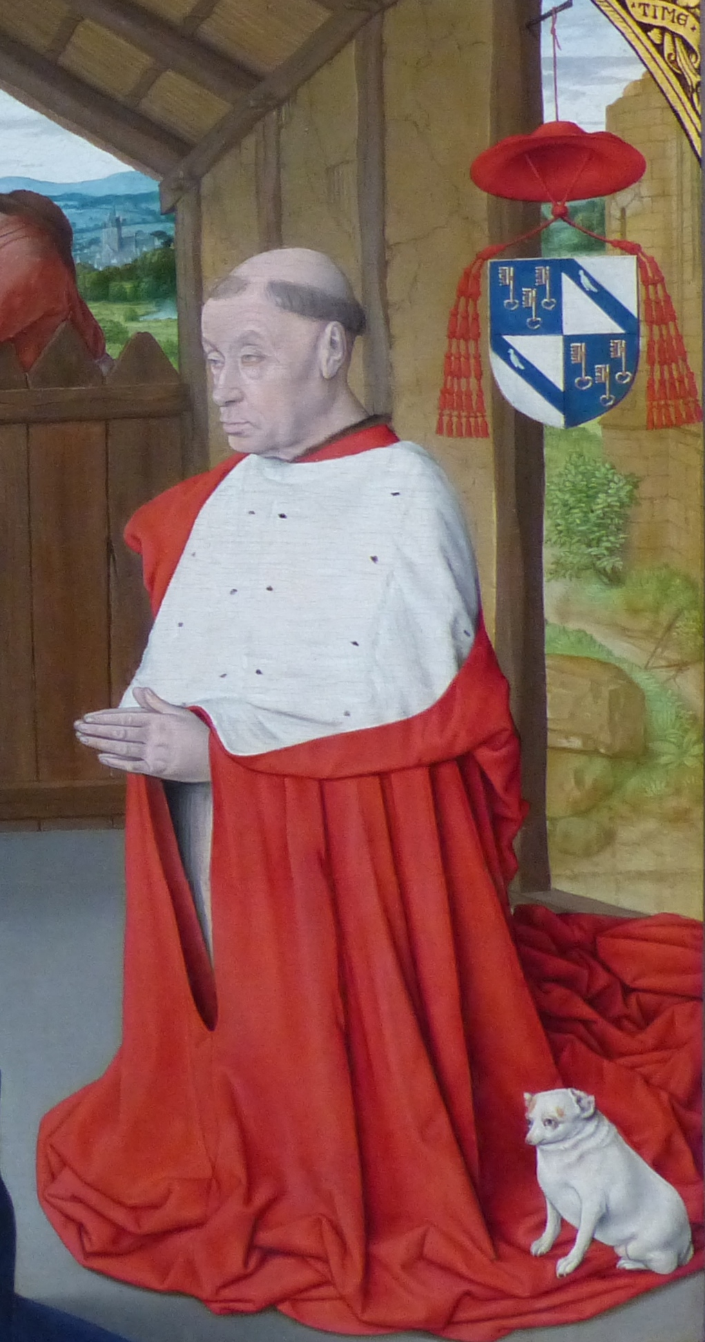 Figure du donateur le cardinal Rolin dans la Nativité d'Autun du Maître de Moulins